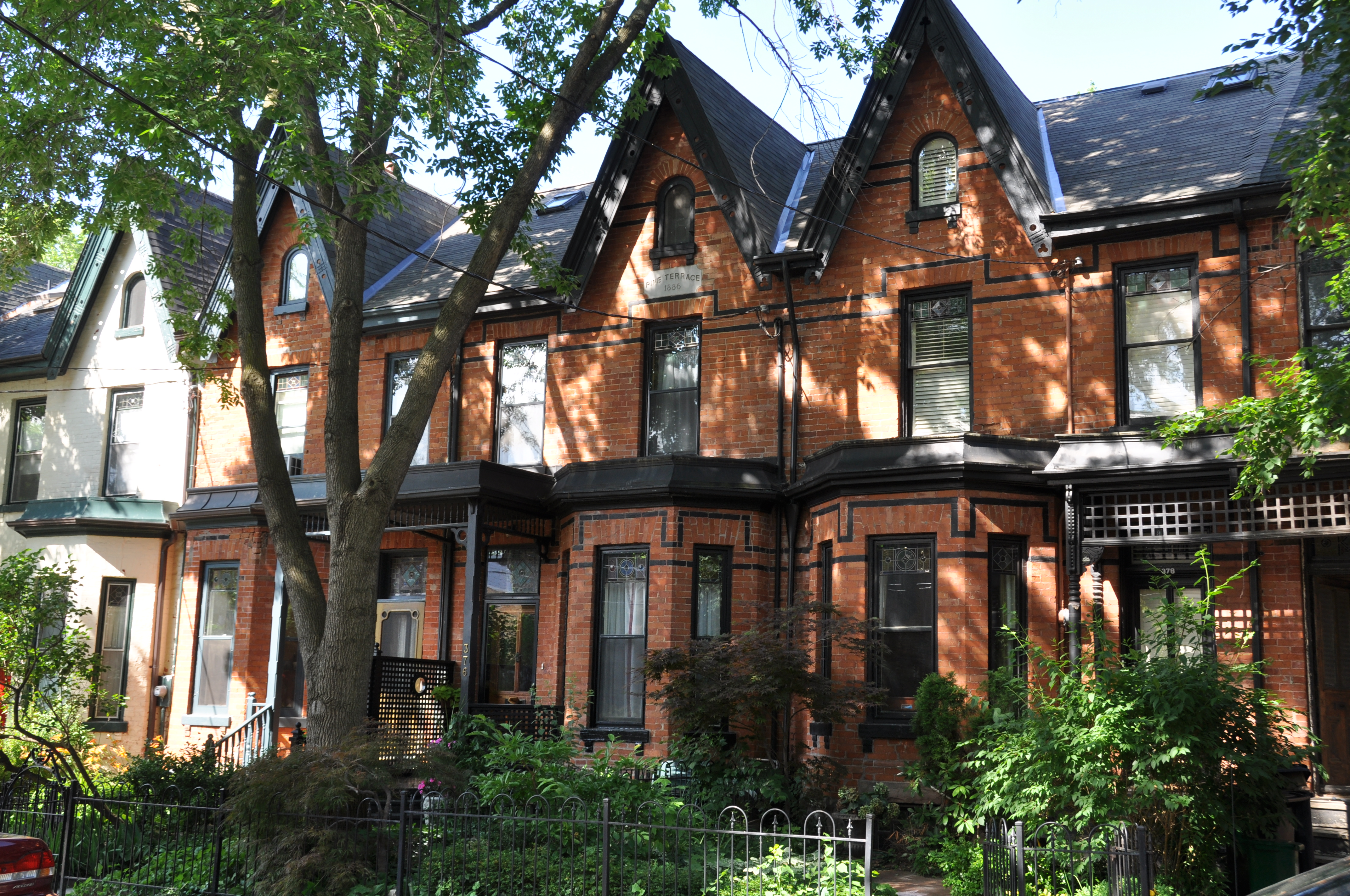 Toronto, Ontario, 2009